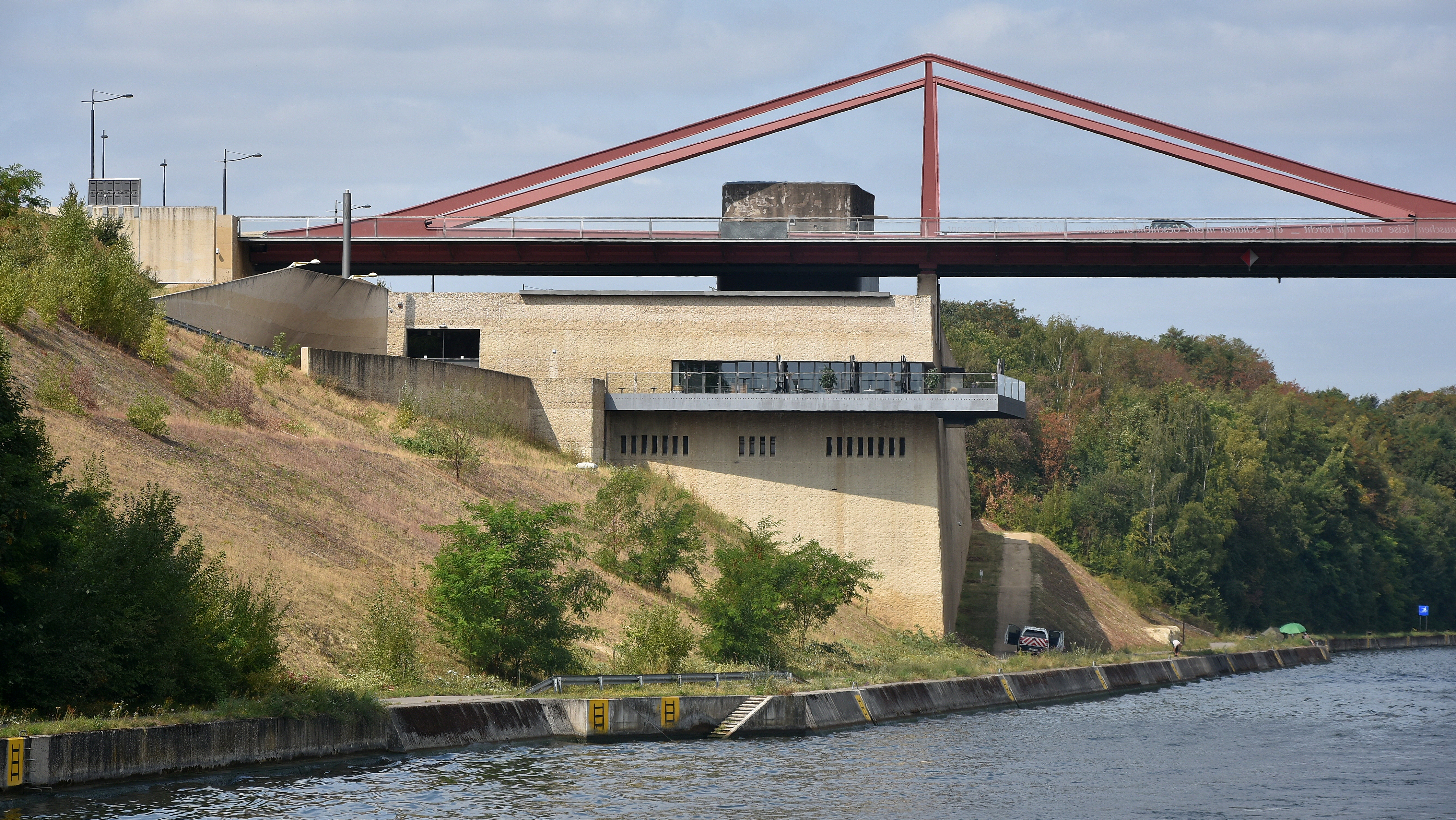 Brug bij Vroenhoven met museum en bunker 28-08-2018 This photo of immovable heritage has been taken in the Flemish Region